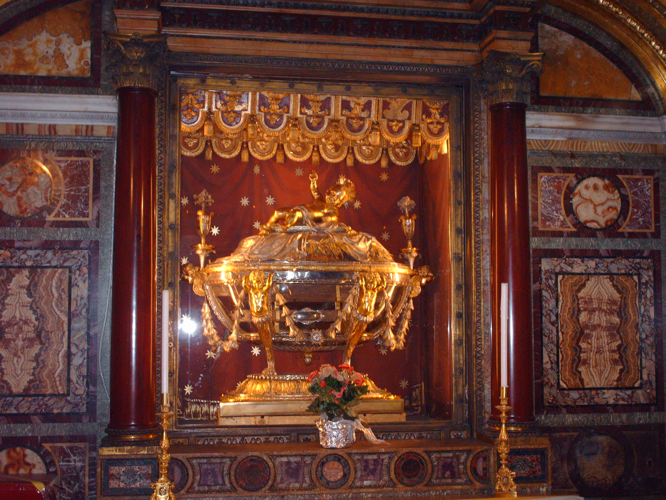 "Sacra Culla" in Basilica di Santa Maria Maggiore, in front of main altar